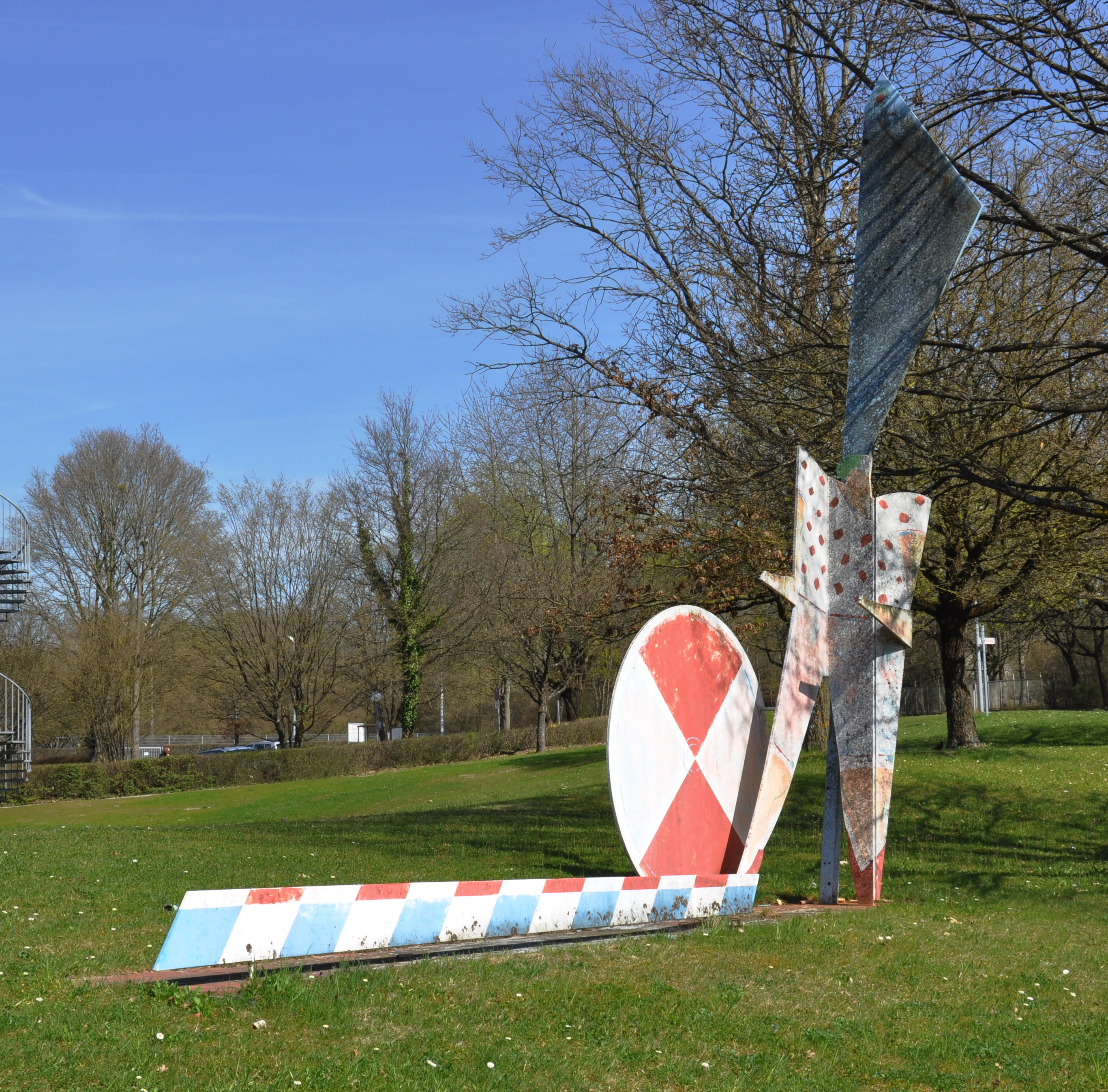 Hochschule Ravensburg-Weingarten (Hauptgebäude, Doggenriedstraße, Weingarten) Skulptur Der Mensch als Maß von Wolfgang Thiel, Stahlblech und Lack, 500 x 620 x 60 cm, 1984, vor der farblichen Überarbeitung durch den Künstler 2012